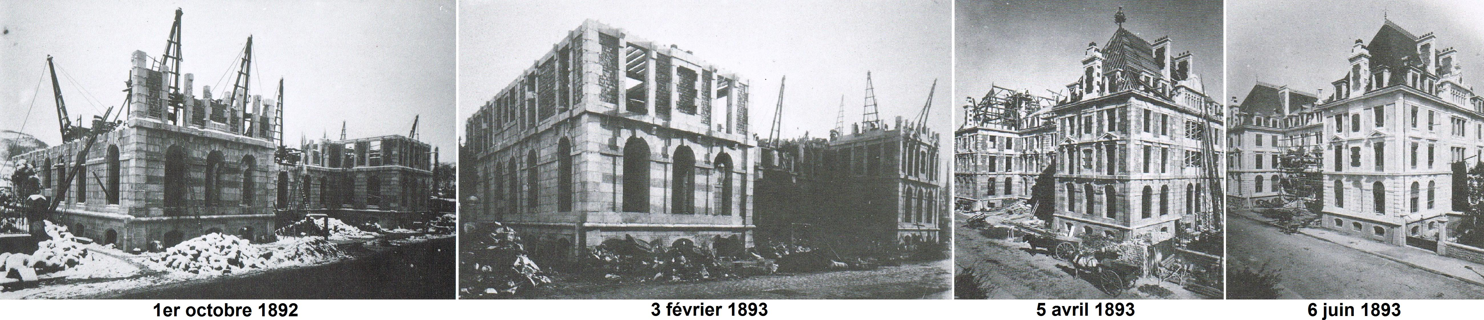 Hôtel des bains de Besançon, avancée des travaux de 1892 à 1893 (montage).